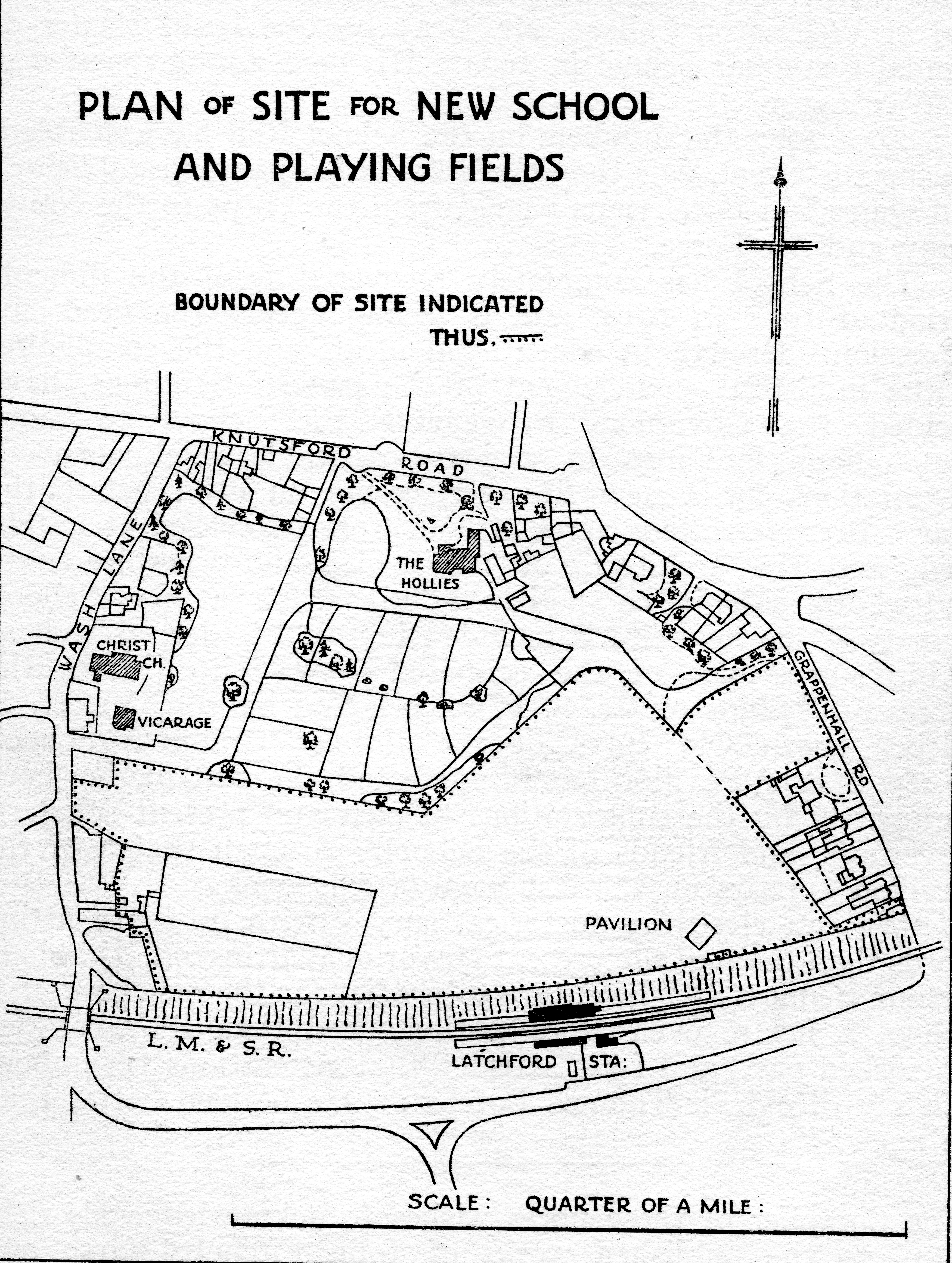 Plan of site for the new school and playing fields